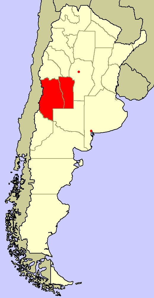 Situación de la revolución libertadora al 18 de septiembre de 1955. Mapa original: Argentina provinces, blank.png